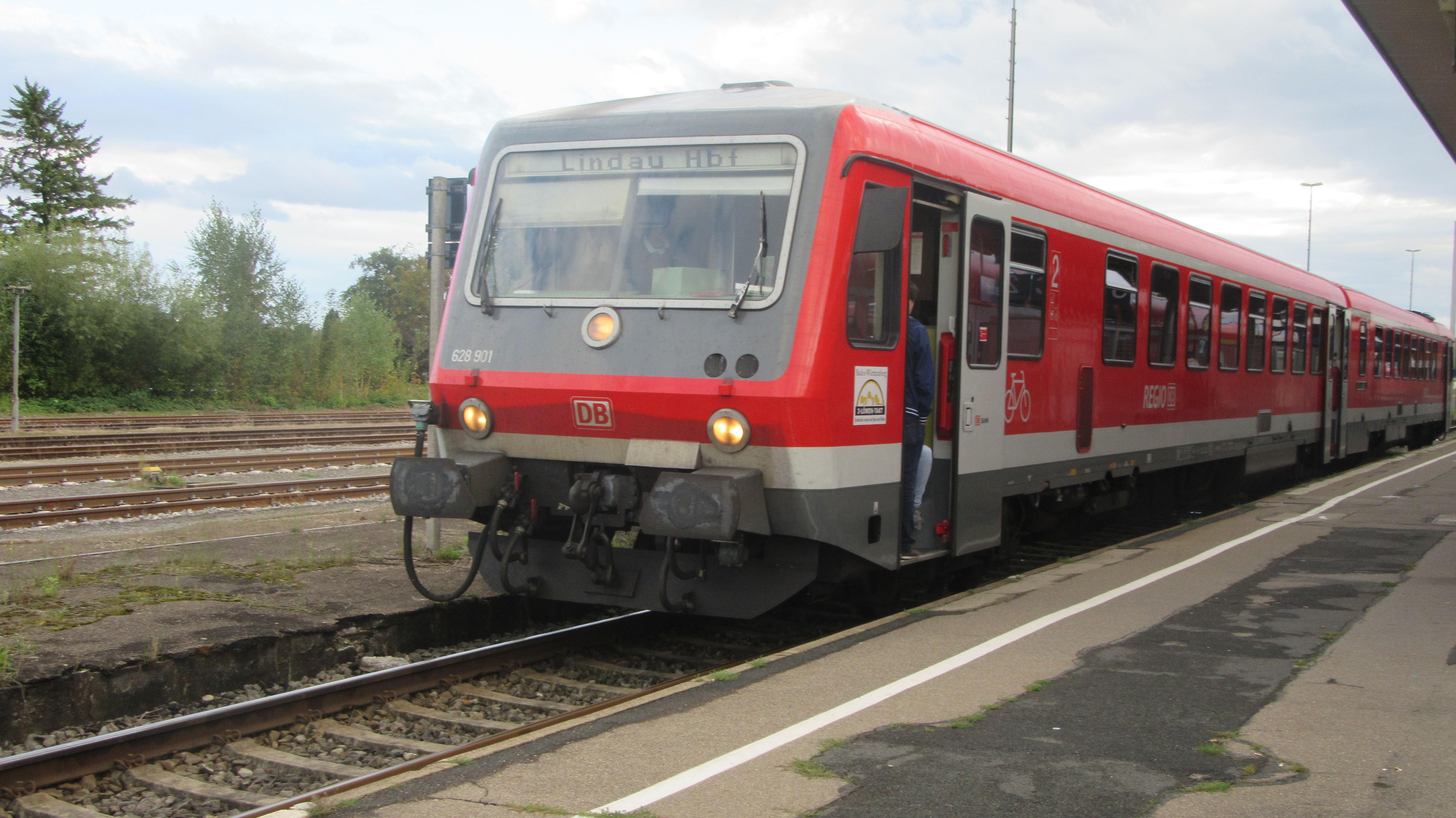 Eine Hälfte des Triebwagens 629 001/628 901 im Bahnhof Aulendorf.